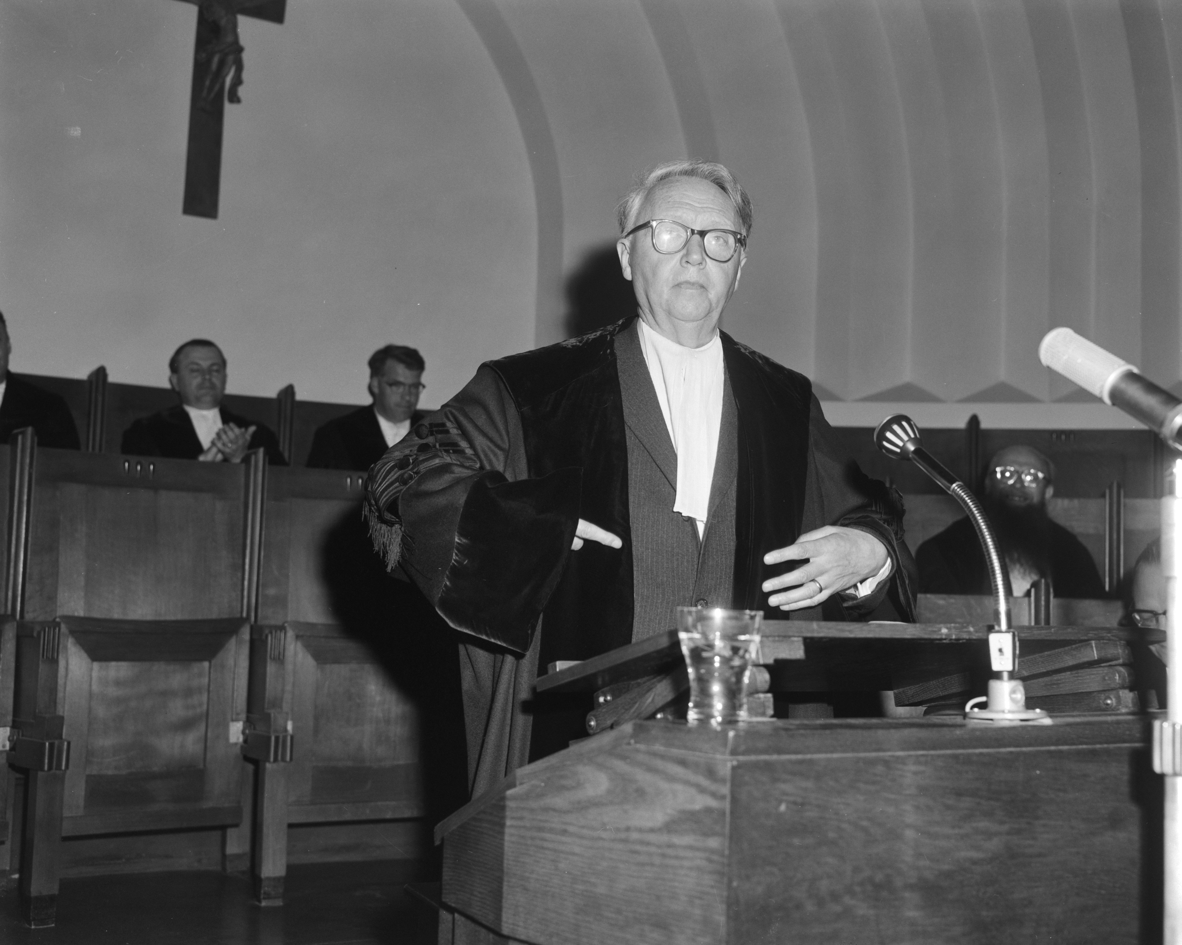 Componist professor Hendrik Andriessen afscheidscollege gehouden Universiteit te Nijmegen. 9 juli 1963